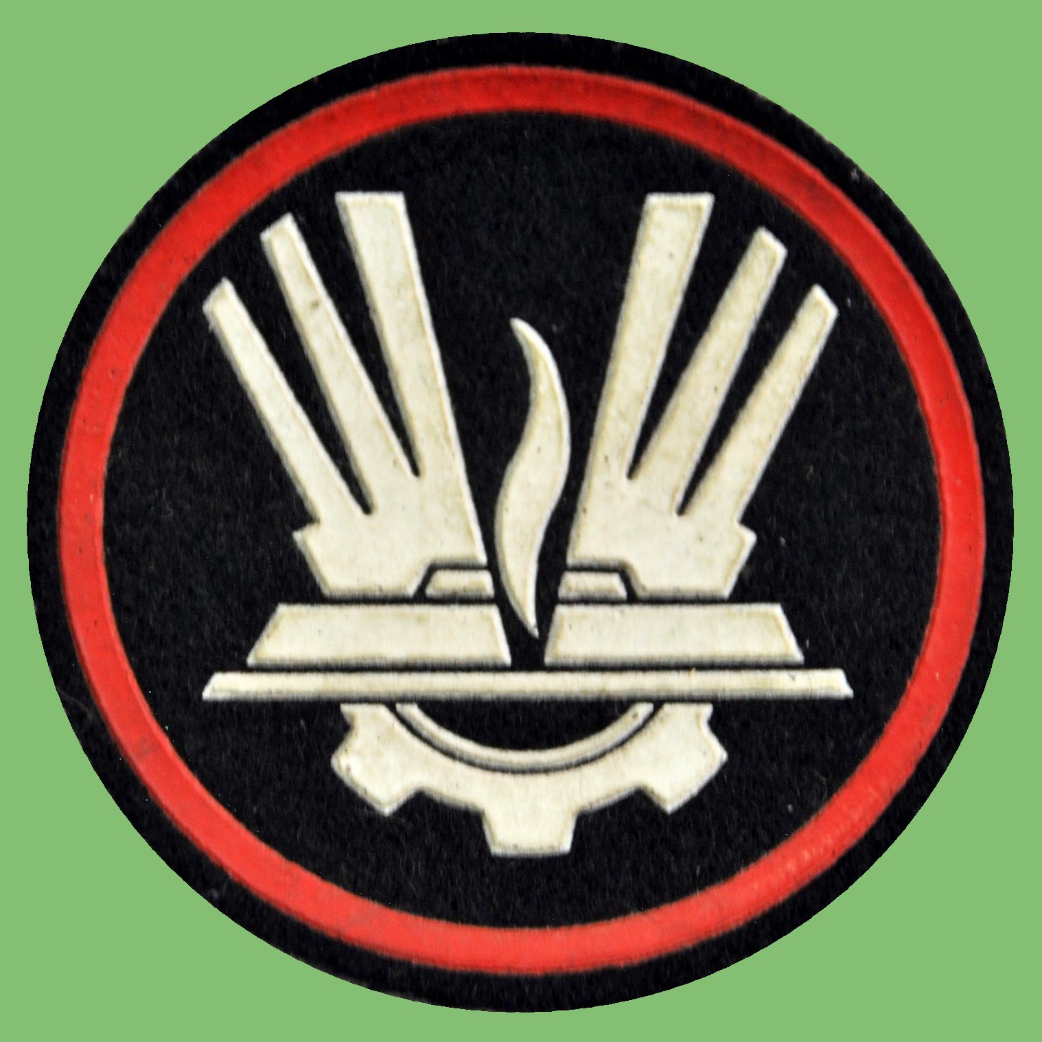 Oznaka wojsk inzynieryjnych